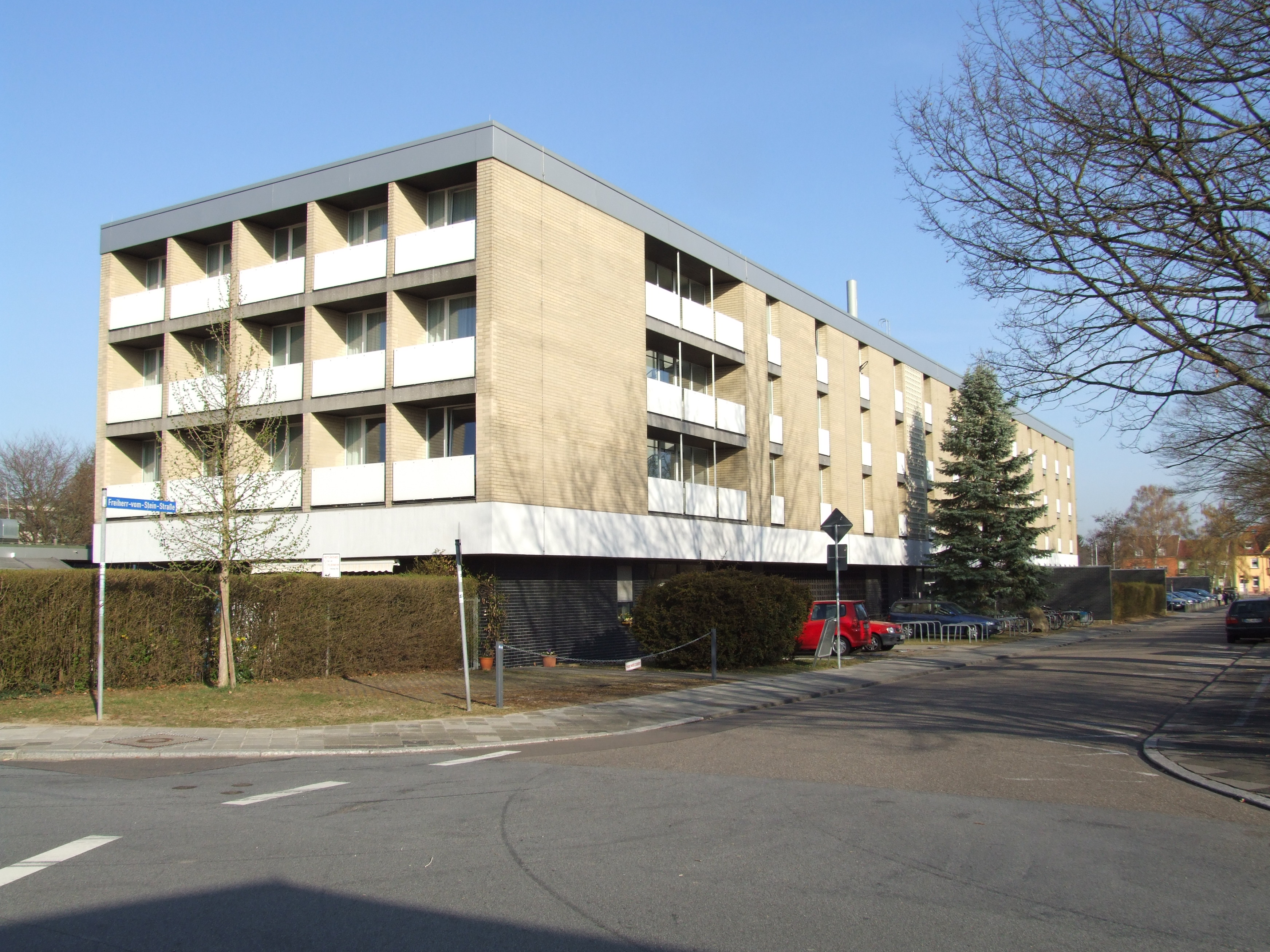 Wohnheim der Deutsche Universität für Verwaltungswissenschaften Speyer von Südosten, Südende der Freiherr-vom-Stein-Str. 2, 67346 Speyer